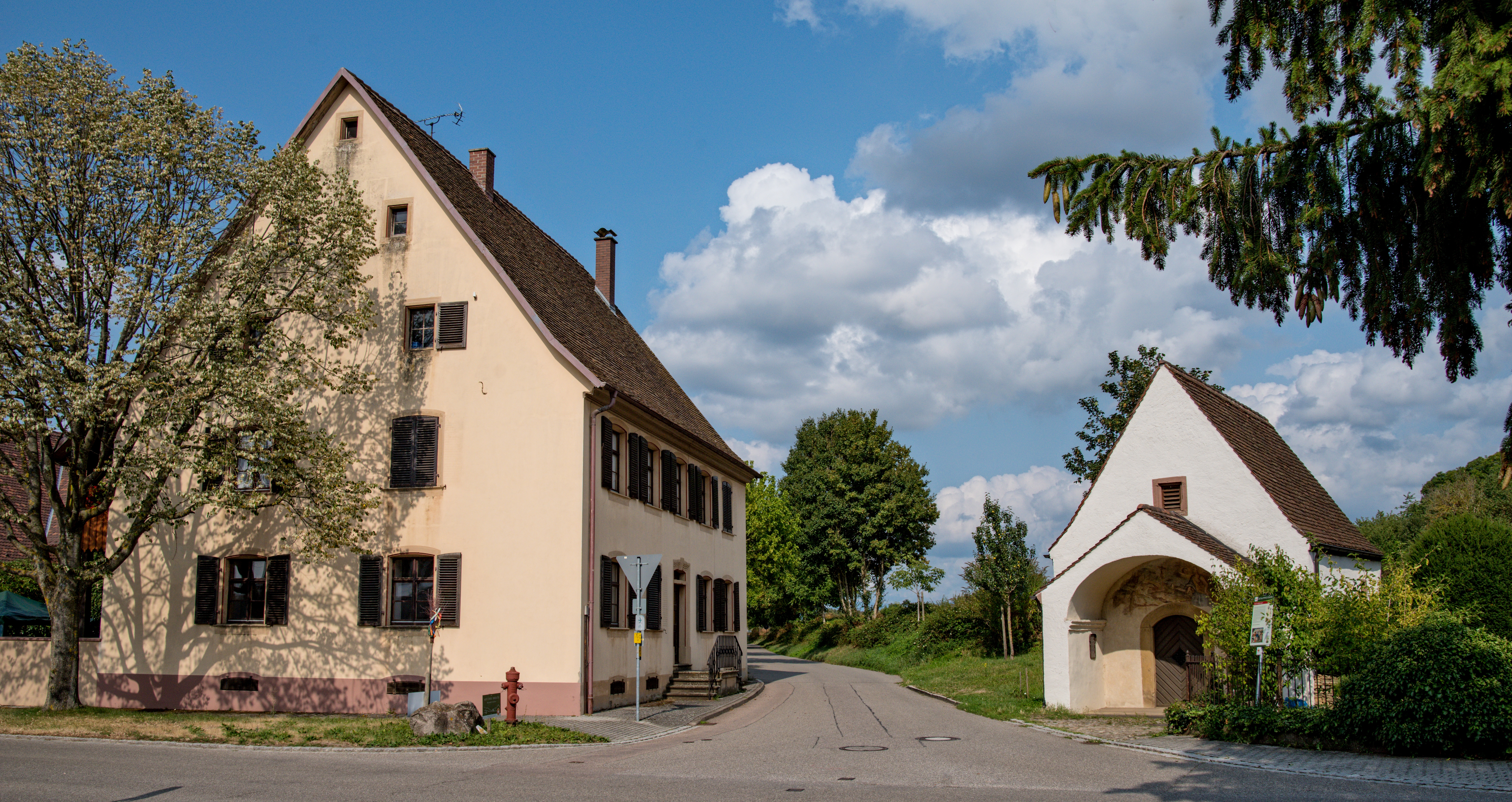 Bilder aus Staufen im Breisgau, die St. Magdalenenkapelle